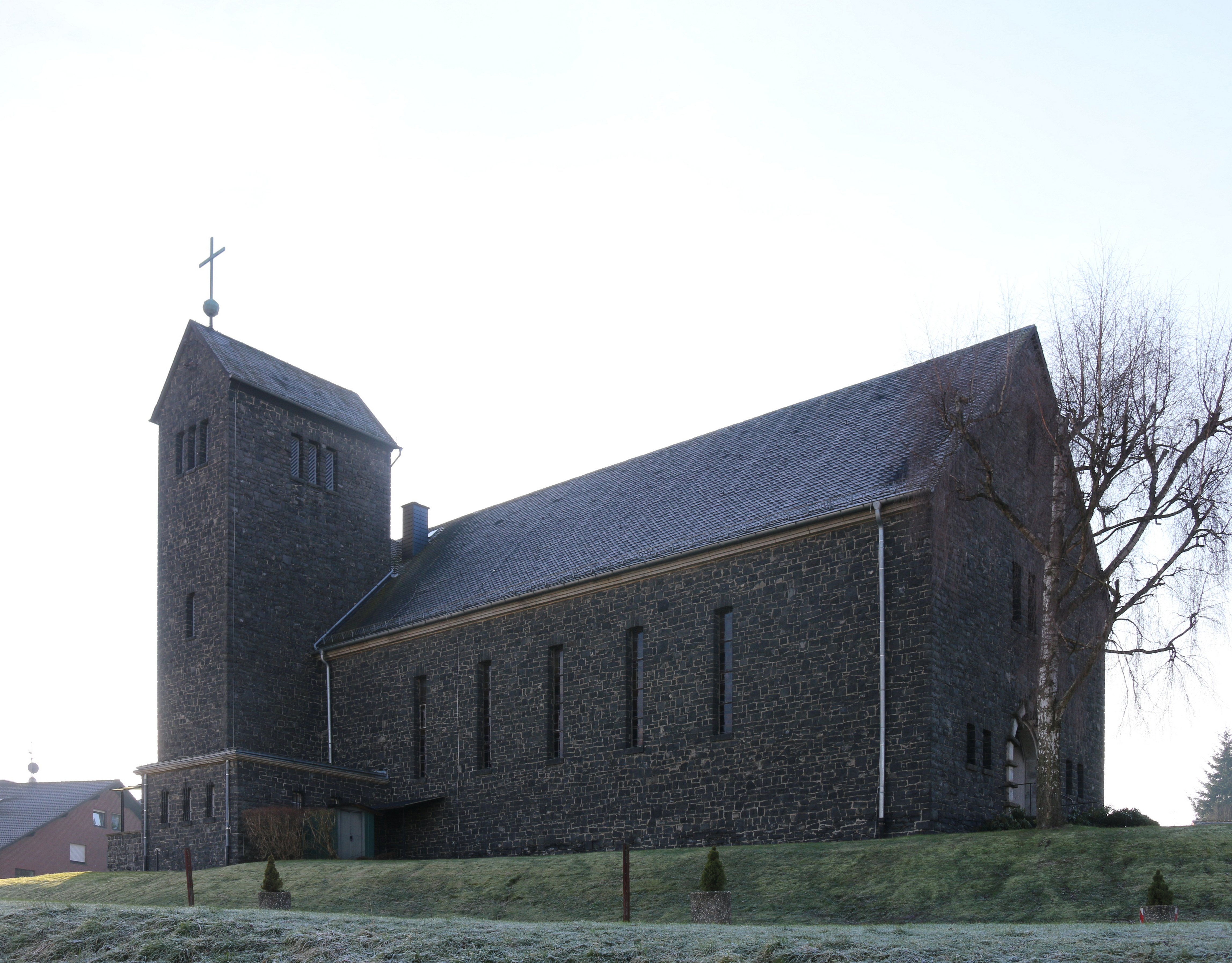 Hintermeilingen: Kirche Mariae Verkündigung